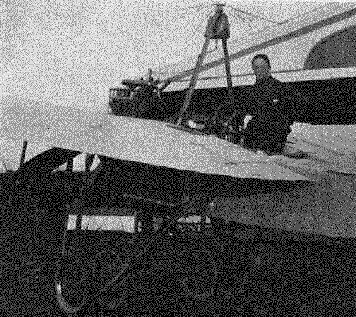 Willy Rosenstein, deutscher Flieger